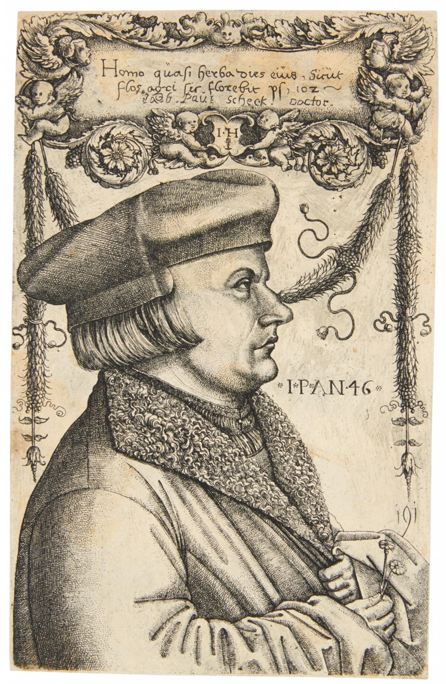 Hieronymus Hopfer - Bildnis des Johannes Pfefferkorn. Eisenradierung auf Bütten. Plattengröße 15,8 x 10 cm